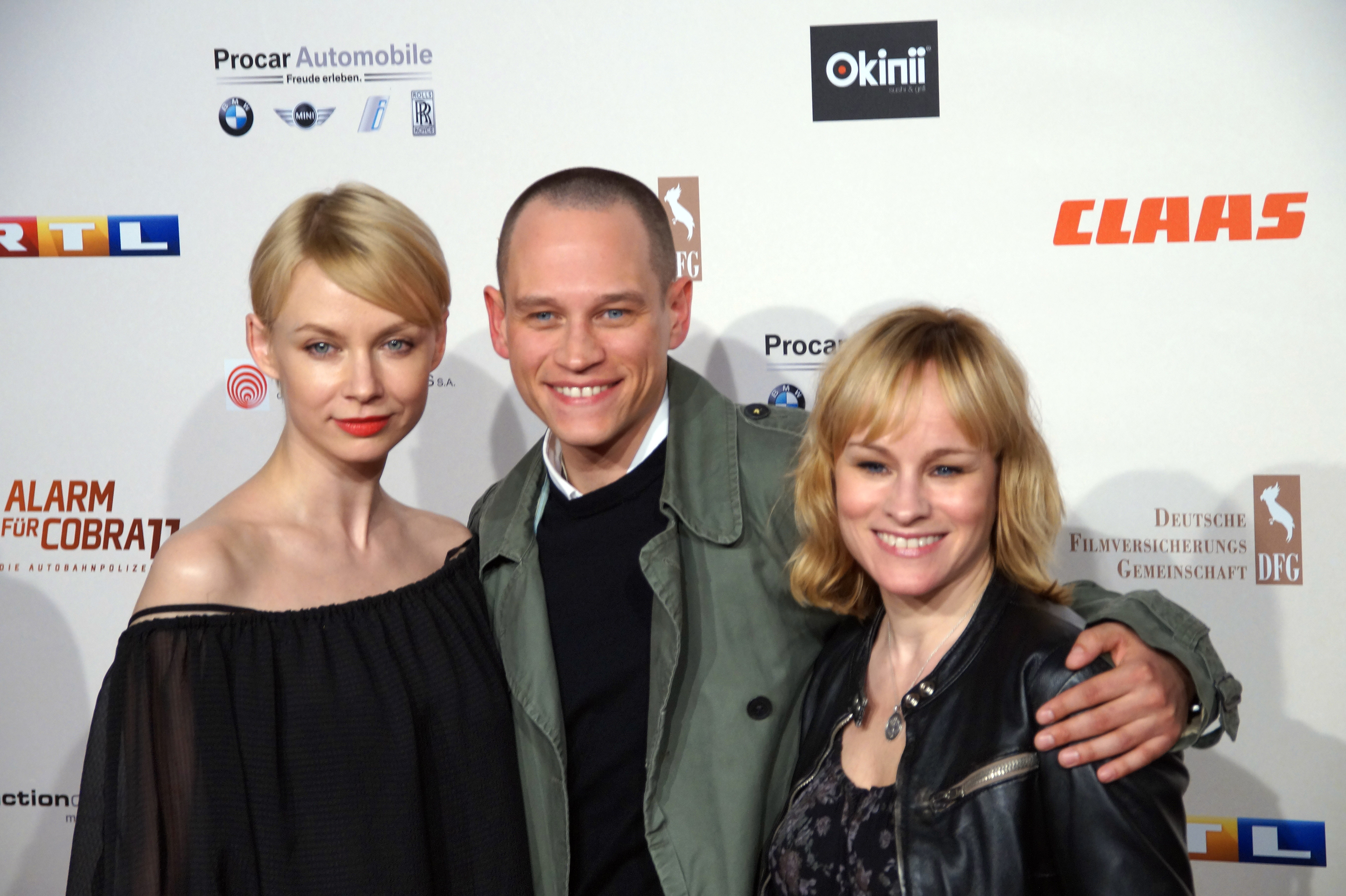 Masha Tokareva, Vinzenz Kiefer, Dorkas Kiefer bei der Premiere von der 300. Folge 'Alarm für Cobra 11', April 2016.